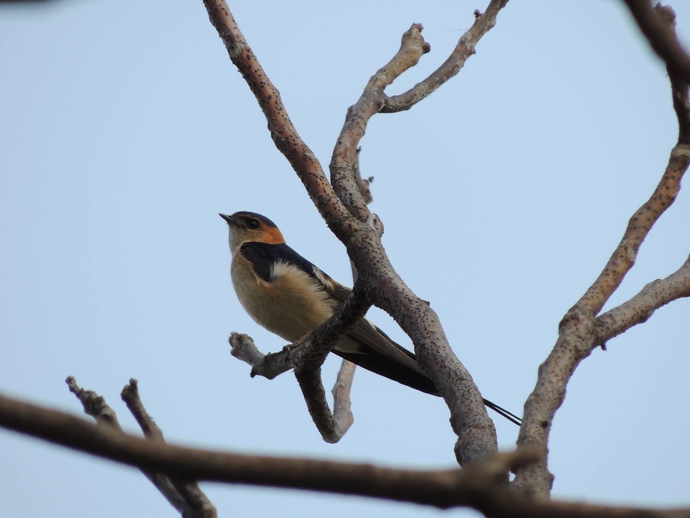 Srpski naziv daurska lasta Opis vrste D.t.14-19 cm. Gnezdeći areal obuhvata mediteransku Evropu, severnu Afriku, Malu Aziju, veliki deo Bliskog Istoka, centralne i istočne Azije. Selica je. Zimu provodi u podsaharskoj Africi i južnoj Aziji. Staništa su joj pretežno klisure, kanjoni i doline u pobrđu i brdsko-planinskim predelima u mediteranskim, submediteranskim i stepskim područjima. Redovno se gnezdi u ljudskim naseljima i na njihovim obodima. Gnezda od blata gradi pod tavanicama kuća, pod mostovima ili u potkapinama stena. Hrani se malim insektima koje lovi u letu. U Srbiji je redovna gnezdarica brdsko-planinskog dela zemlje, čija se populacija procenjuje na gnezdećih 600-1.000 parova (Puzović et al 2003). Status zaštite vrste IUCN crvena lista - Kategorija LC; Ptice od posebnog značaja za zaštitu u Evropi: Non SPEC; Konvencija o očuvanju evropske divlje flore i faune i prirodnih staništa - Annex I; Pravilnik o proglašenju i zaštiti strogo zaštićenih i zaštićenih divljih vrsta biljaka, životinja i gljiva: Prilog I Strogo zaštićene divlje vrste biljaka, životinja i gljiva